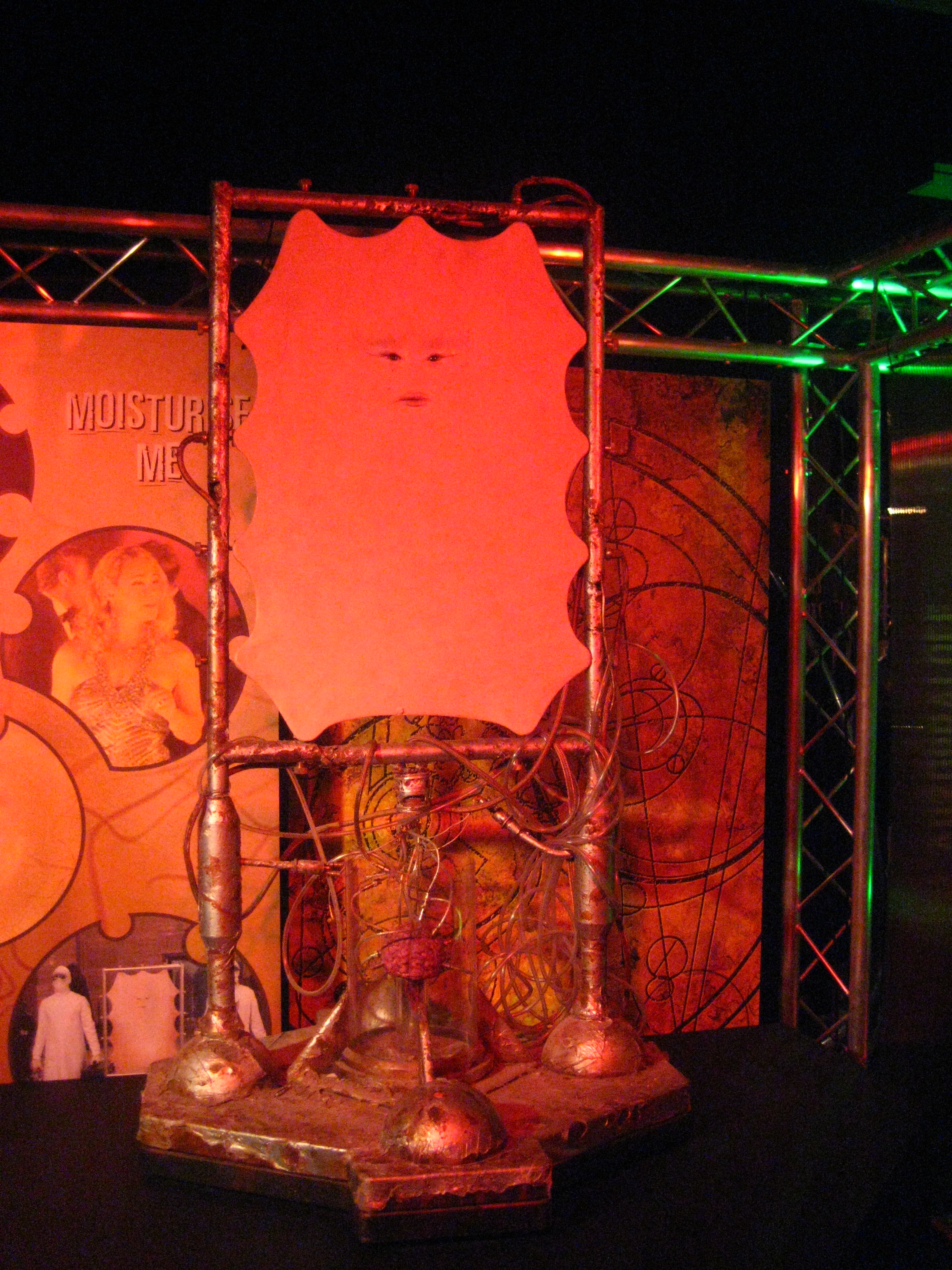 Cassandra